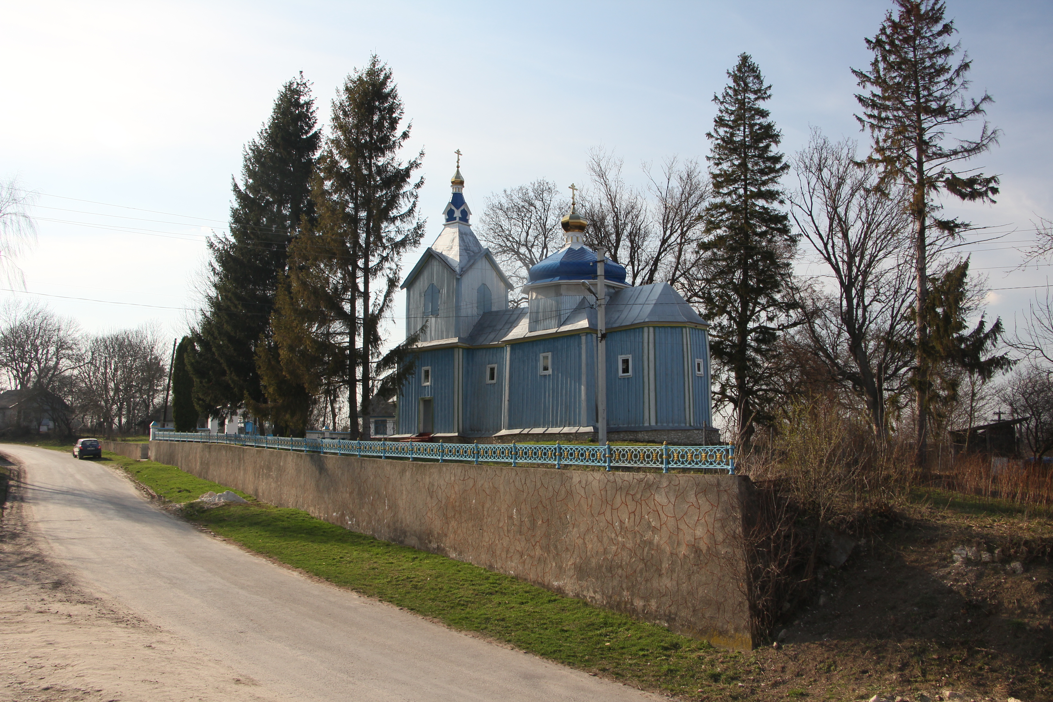 Дерев'яна церква села Оришківці Лановецького району, Тернопільскої області